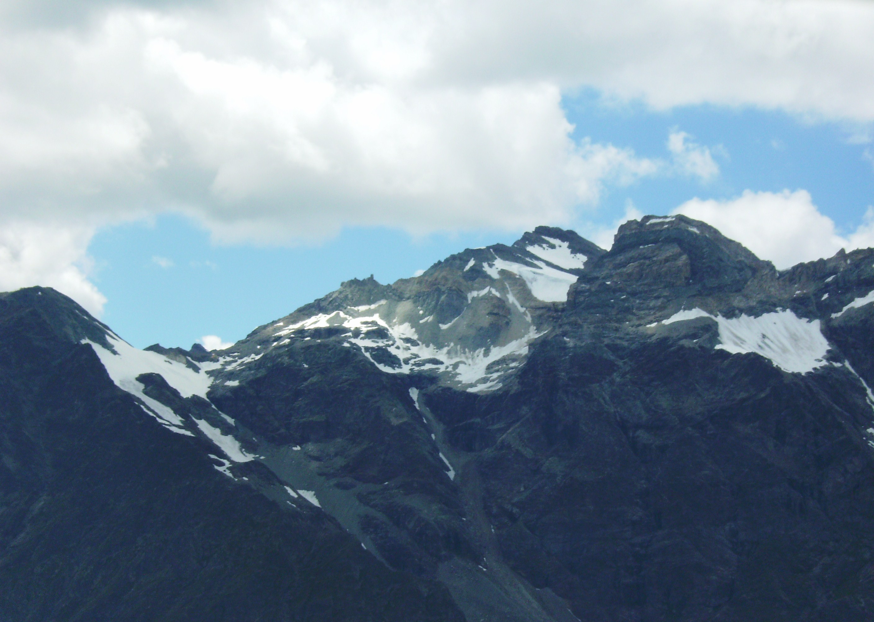 Il Mont Rous, lo Chateau des Dames e il Mont Blanc du Creton